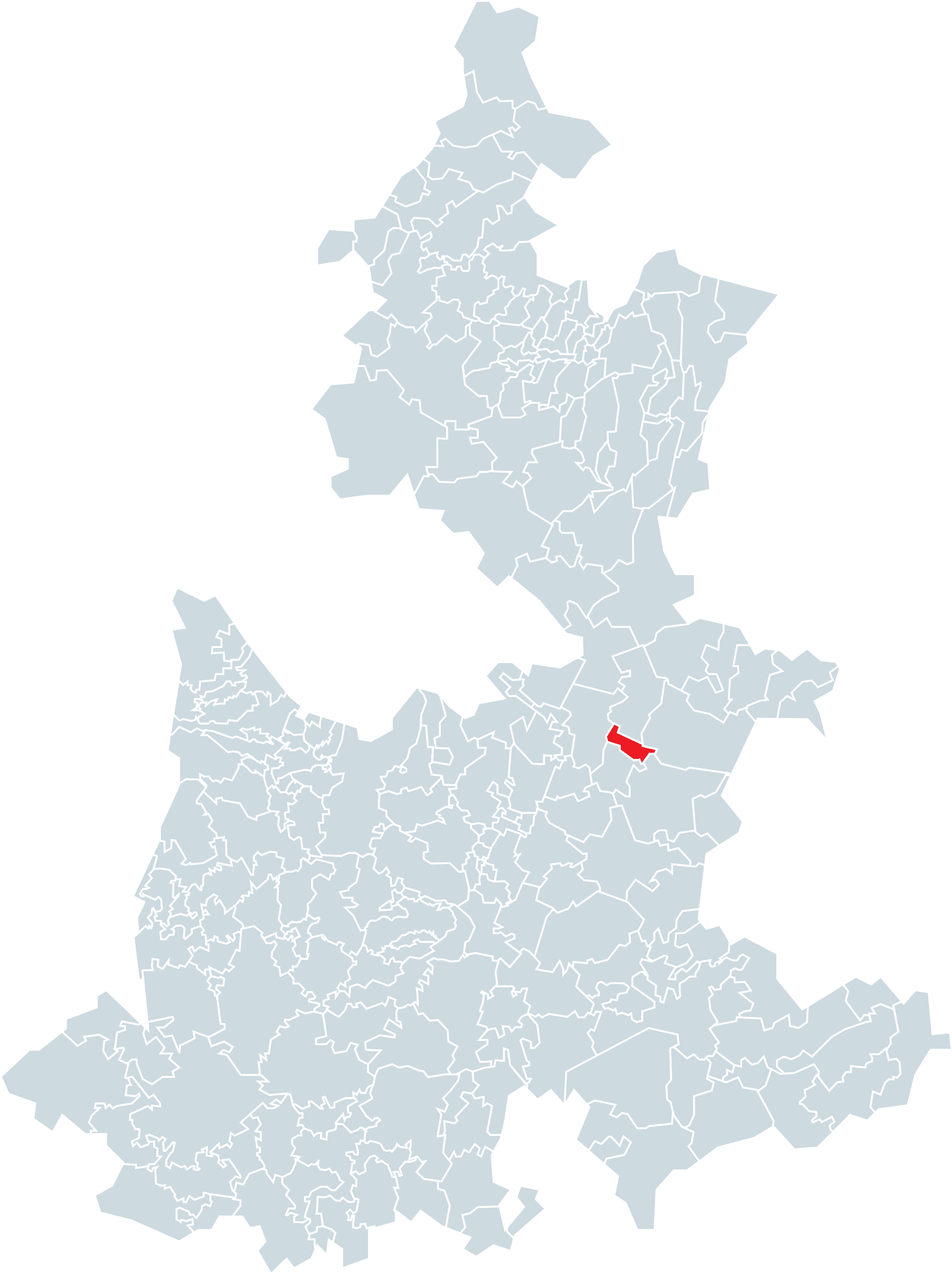 Municipio de Aljojuca